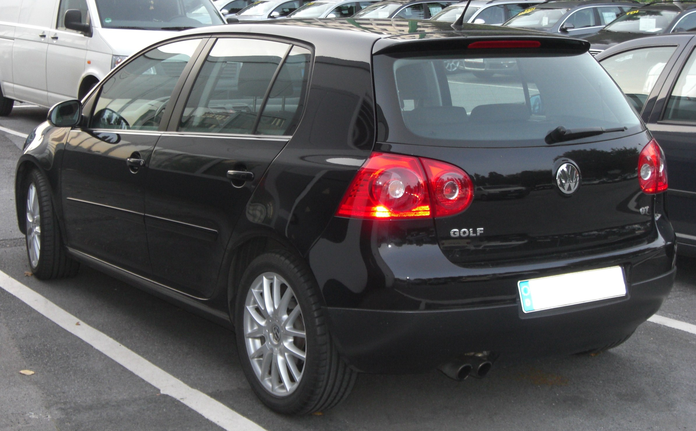 VW Golf GT